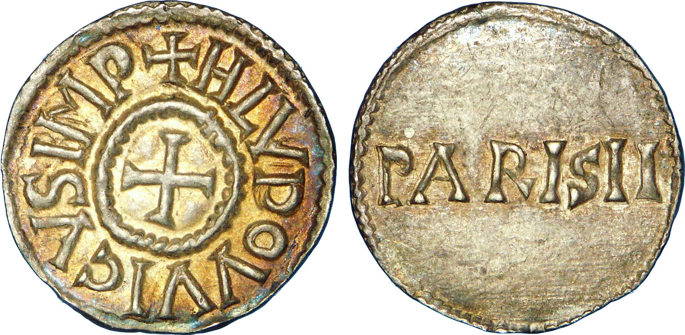 Nom de l'atelier/ville : Paris Métal : argent Diamètre : 19,5mm Axe des coins : 1h. Poids : 1,80g. Degré de rareté : R2 Titulature avers : + HLVDOVVICVS IMP. Description avers : Croix. Traduction avers : (Louis empereur). Titulature revers : PARISII. Description revers : dans le champ. Traduction revers : (Paris).